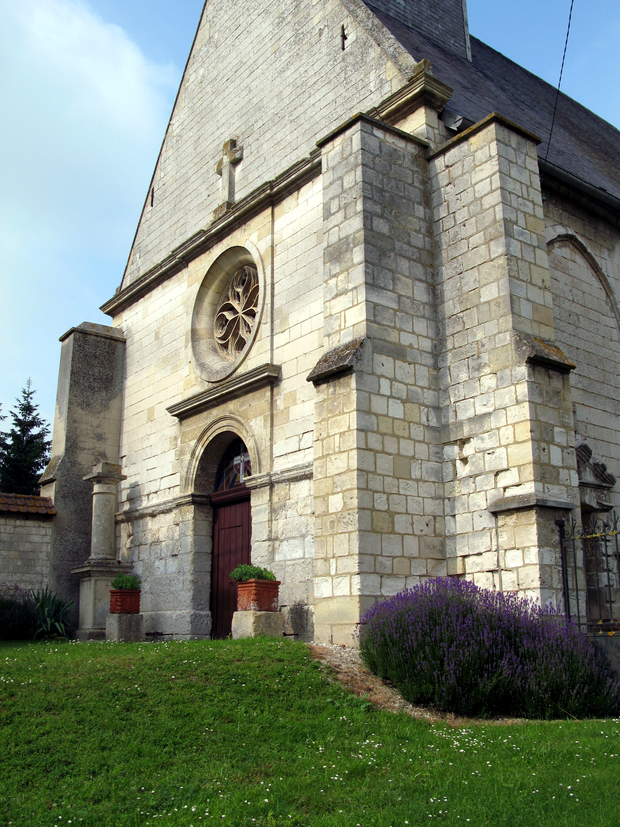 Namps-Maisnil (Somme, France) - L'église de Taisnil (Louis Leclercq créateur du village composant désormais, avec d'autres, la commune de Namps-Maisnil) est en léger surplomb par rapport à la rue. .